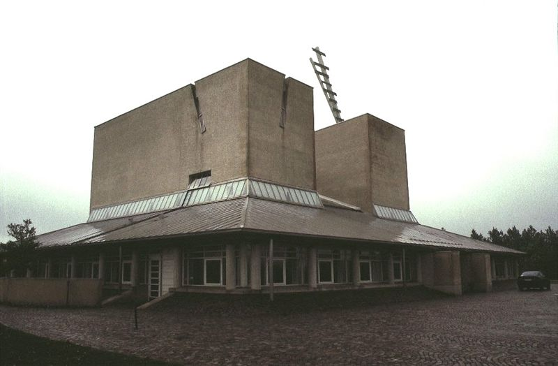 Fonnesbæk Kirke i Danmark. Fonnesbæk kirke